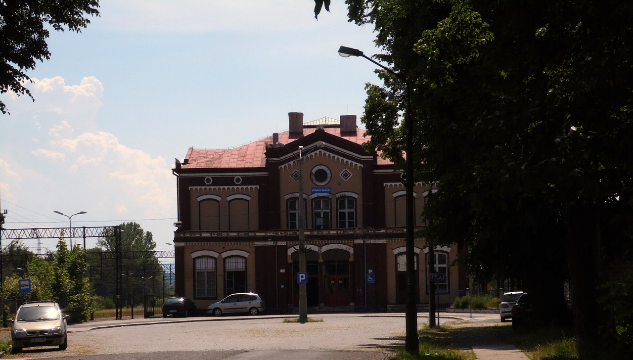 Dworzec PKP.